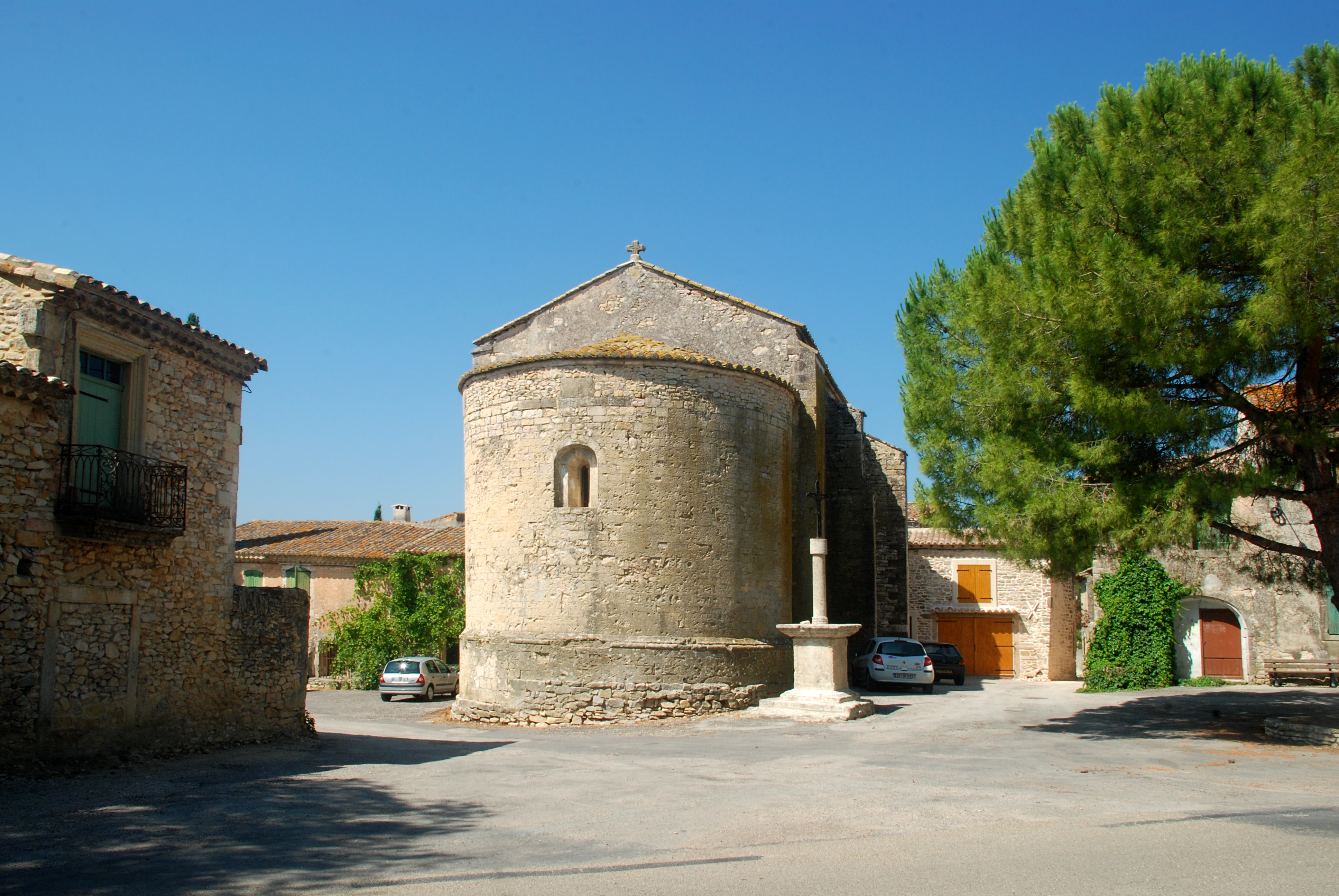 France - Gard - Église de Saint-Étienne d'Escattes